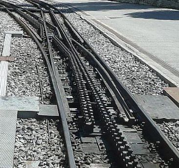 Zweilamellige Zahnstangenweiche System Abt der Gornergratbahn in Riffelalp